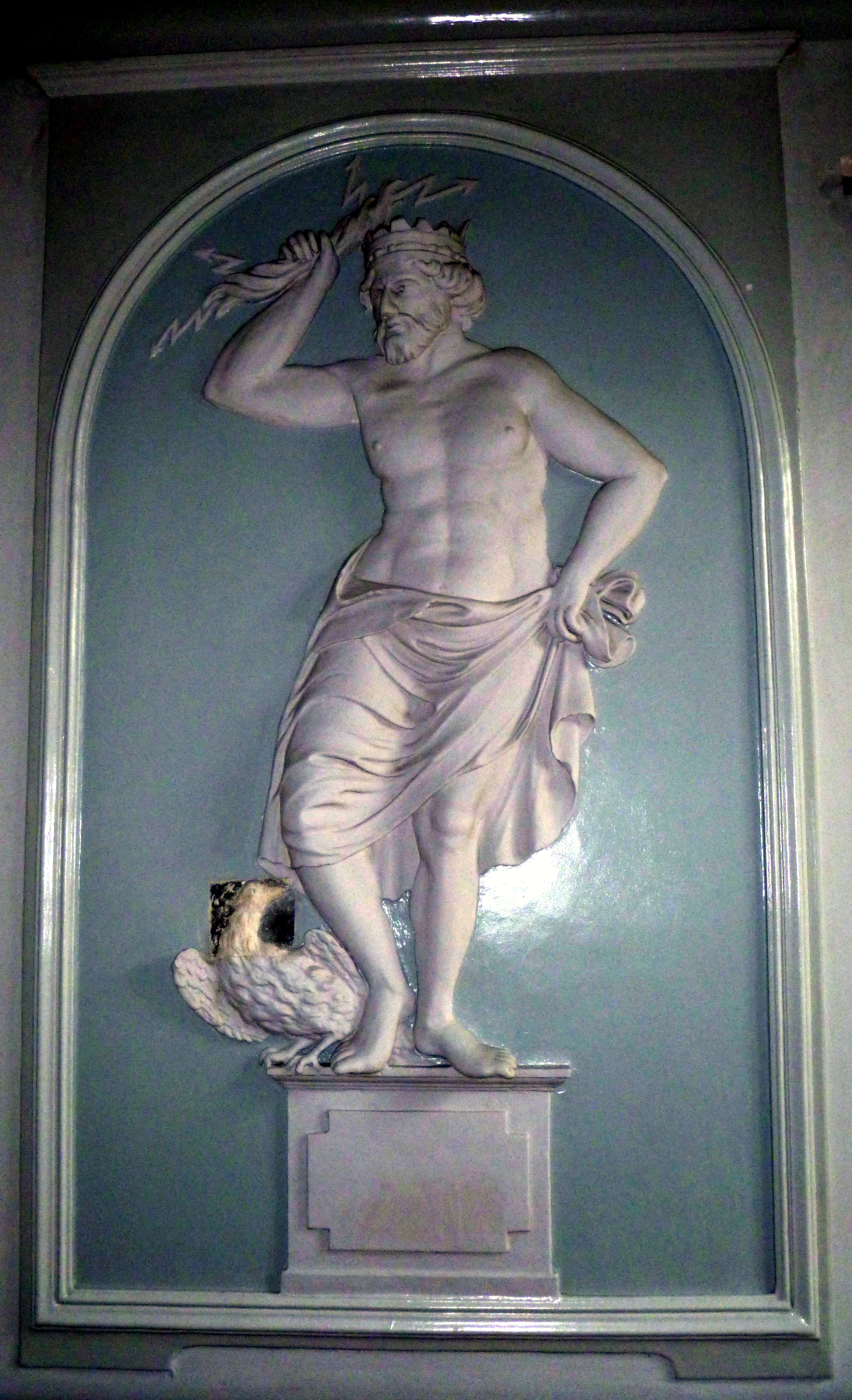 Gagini-Stuck (Zeus) im Haus Klötzerbahn 27, Friedensgeericht Eupen